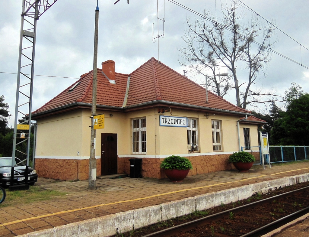 Trzciniec k. Bydgoszczy, gmina Białe Błota